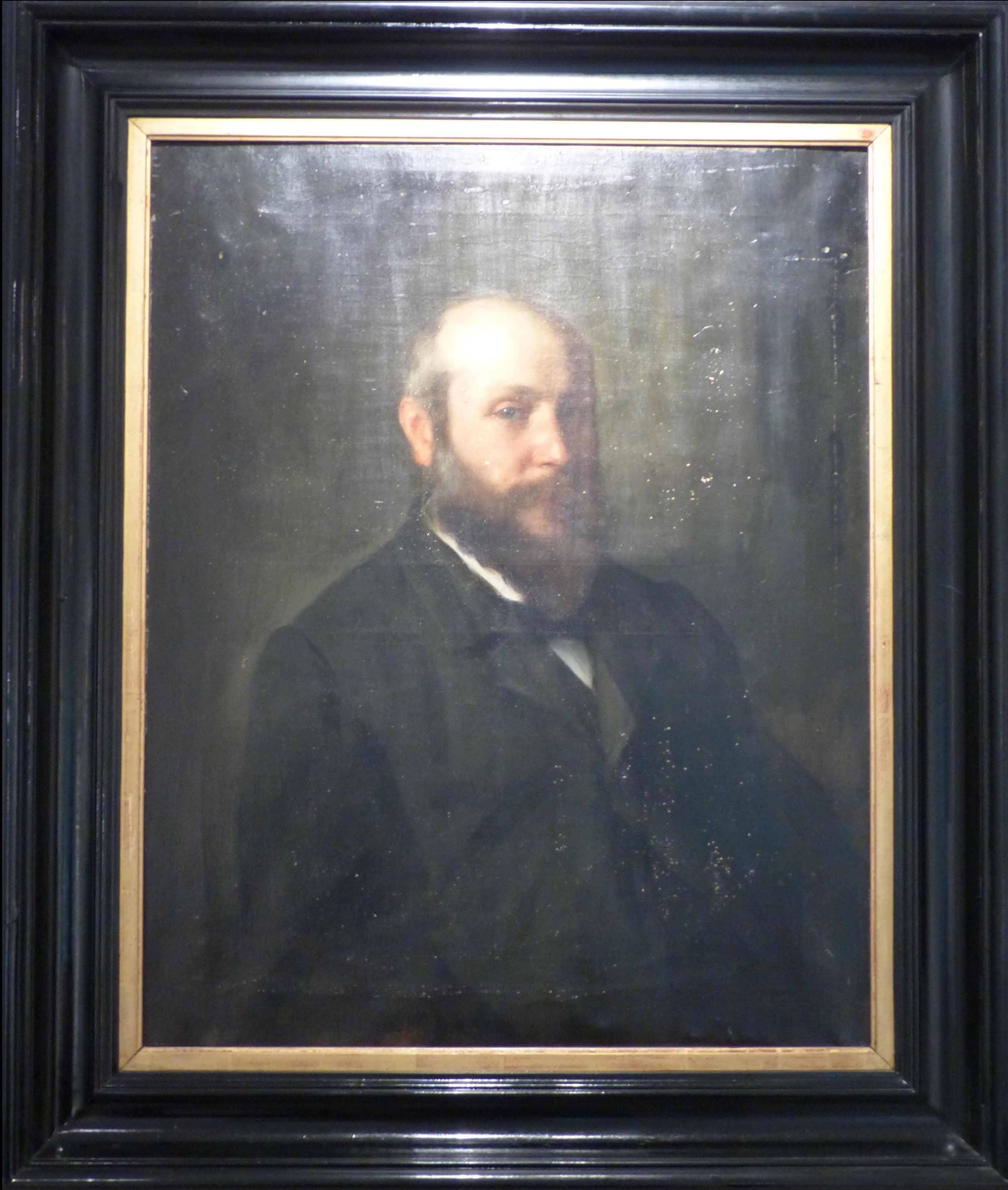 Portrait de Gabriel Delarue par Fernand de Launay (1877-1904). Huile sur toile (1887). Gannat, Musée Yves-Machelon, legs Delarue.